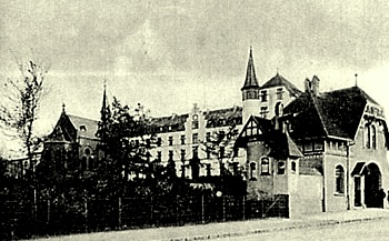 ehemalige städtische Krankenanstalten St. Elisabeth, Aachen, Goethestraße, heute Haus der Missio